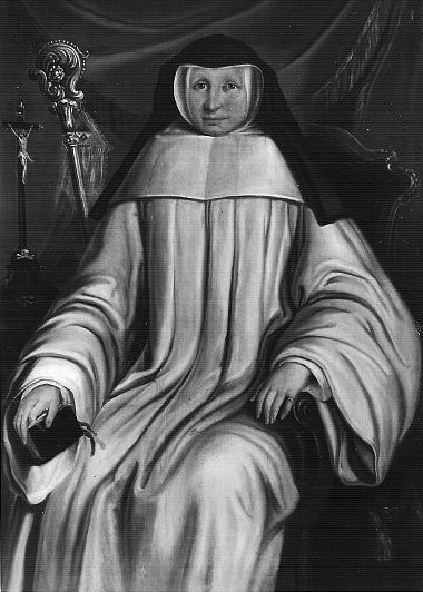 Dame Scolastique Daivier Peinture de 1780 Source Archives de l'abbaye de Soleilmont